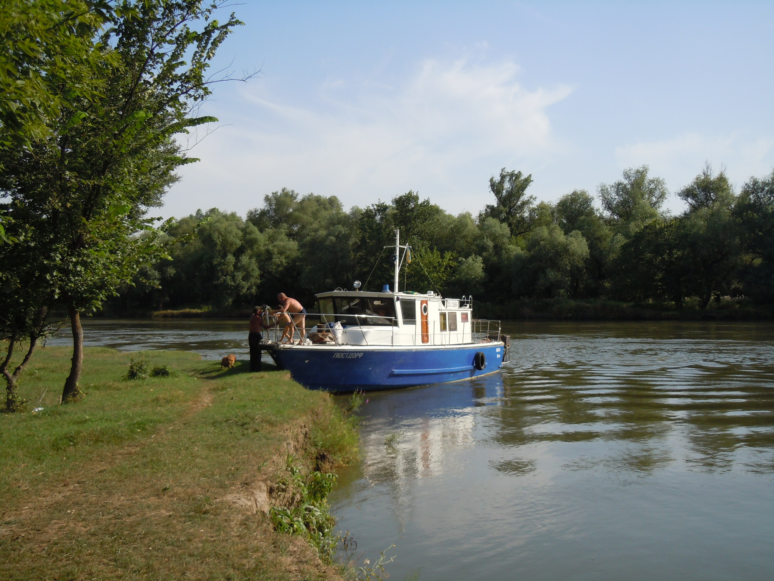 Ріка Турунчук біля села Яськи, Одеська область